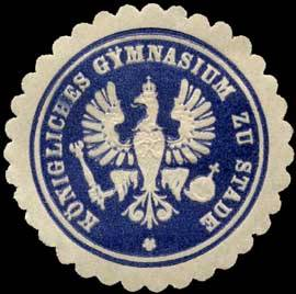 Sealing stamp Title: Königliches Gymnasium zu Stade Description: blau, weiß, geprägt Place: Stade size: 3 cm